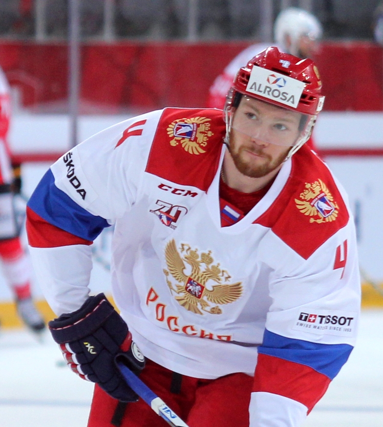 Vladislav Gavrikov (R 4).